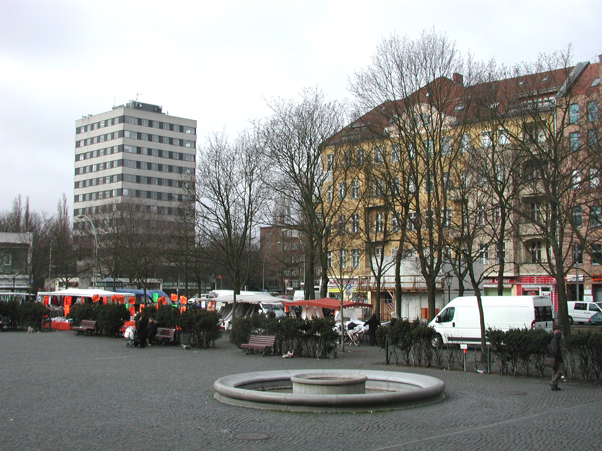 Springbrunnen und Ökomarkt auf dem Leopoldplatz; dahinter eh. Rathaus Wedding (Hochhausgebäude)